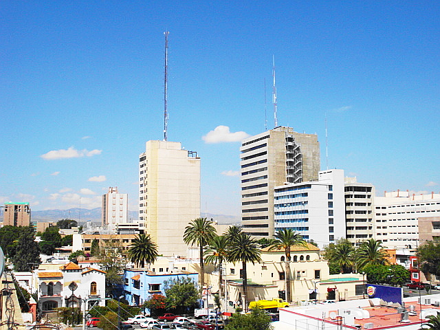 Edificios de la Avenida Carranza en San Luis Potosi.